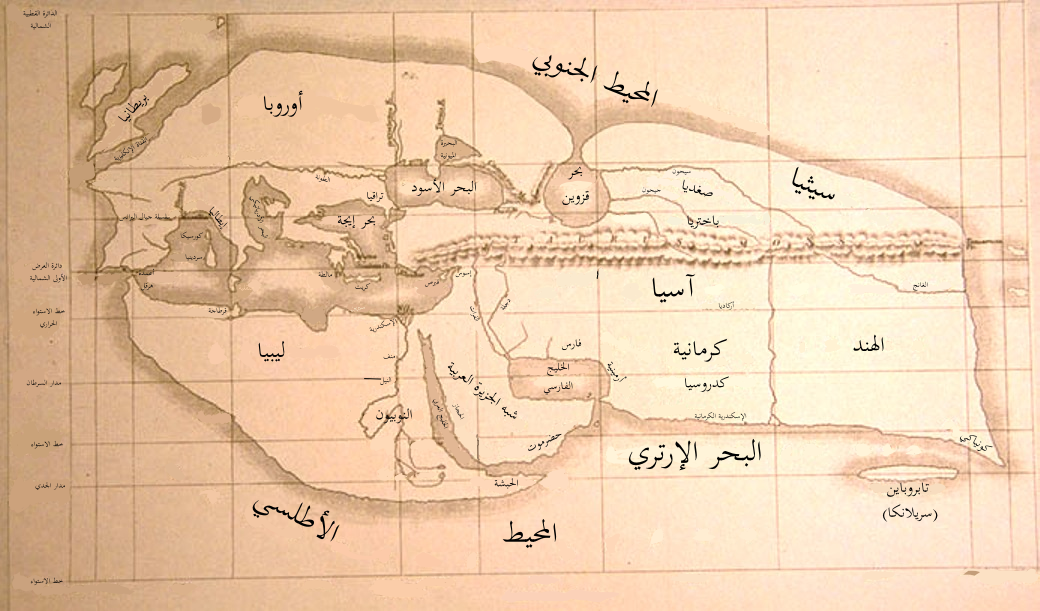 خريطة العالم المعروف لإراتوستينس المُعاد إنشاؤها خلال القرن التاسع عشر. رُسمت الخريطة الأصلية قرابة عام 194 ق.م.